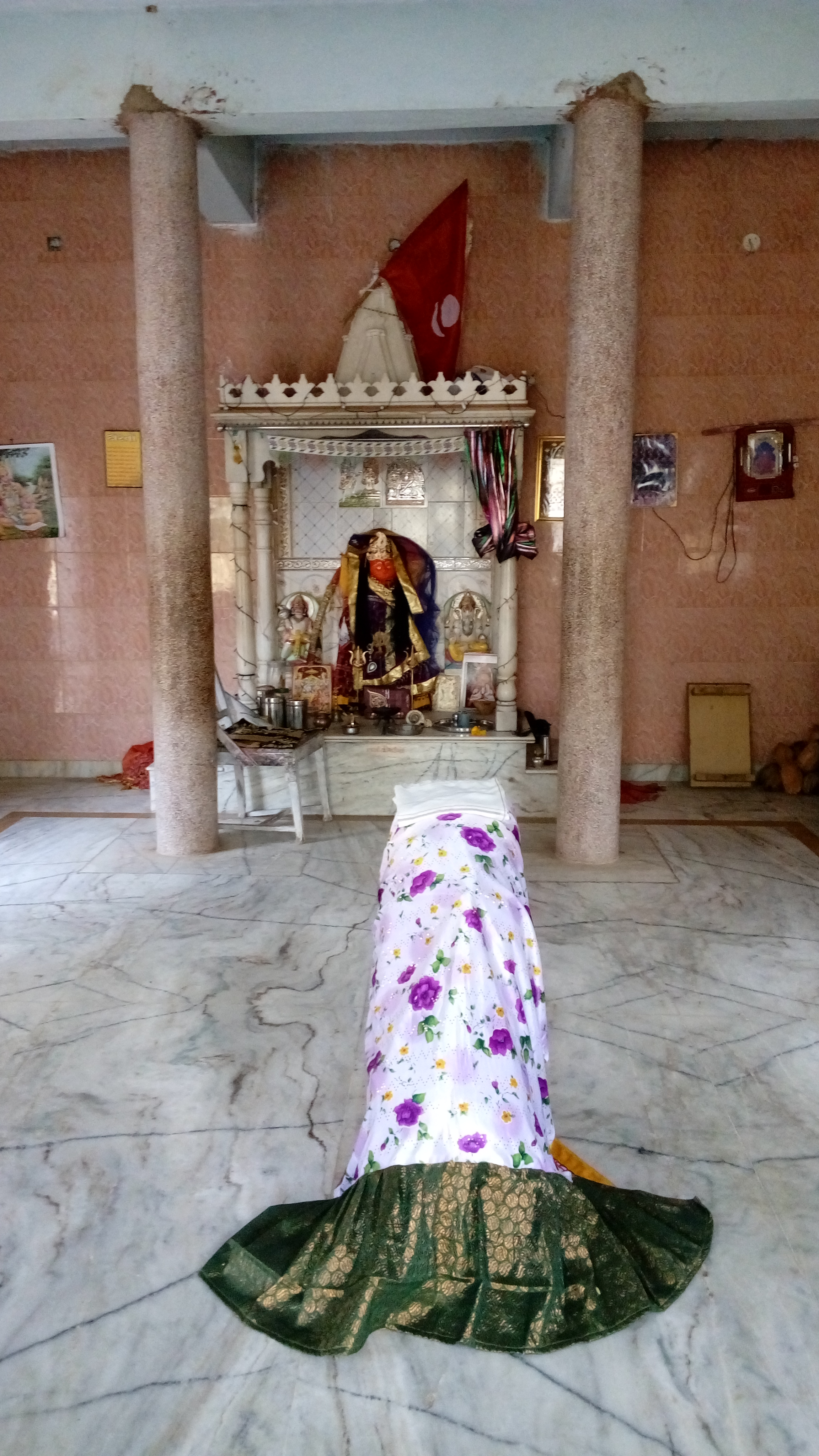 Goddess Tapakeshwari at the Tapakeshwari Temple near Bhuj, Kutch, Gujarat, India